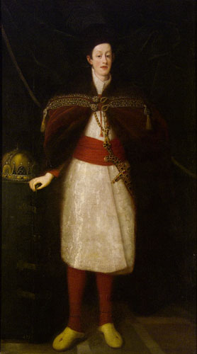 Ferdinand III in magyar dresslabel QS:Len,"Ferdinand III in magyar dress"label QS:Lhu,"III. Ferdinánd mint magyar király"